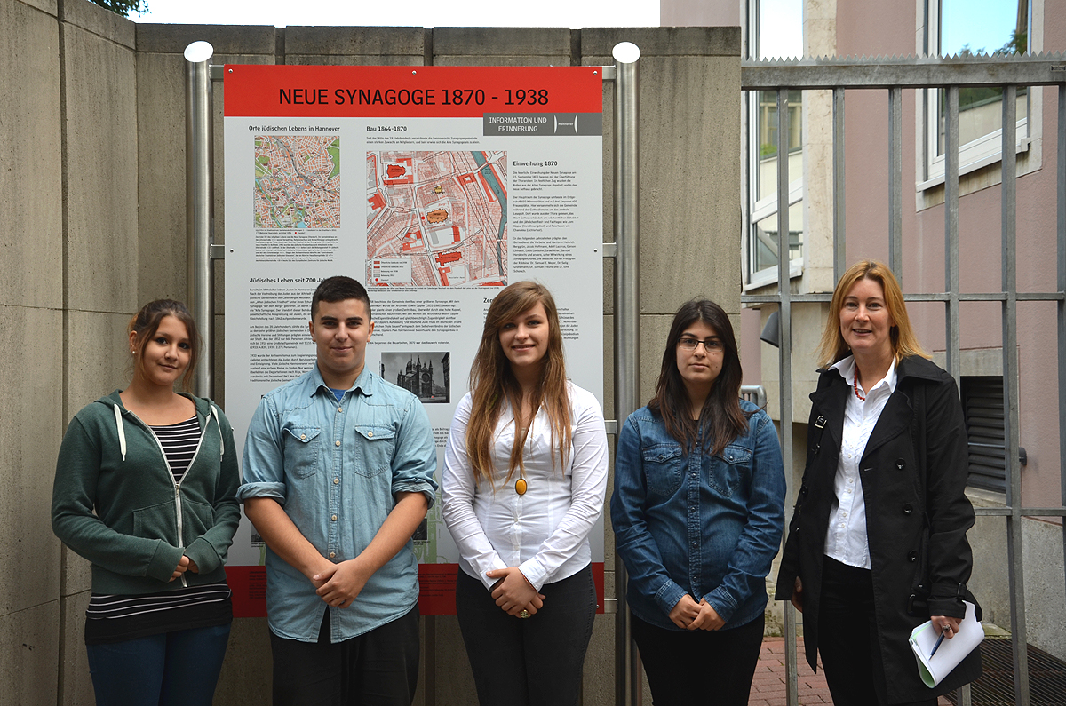 An der Stelle der ehemaligen Neuen Synagoge in Hannover, die durch die Nationalsozialisten zerstört wurde (in der Nacht vom 9. auf den 10. November 1938, der sogenannten Reichspogromnacht), wurde am 15. September 2013 eine ausführlichere Informationstafel enthüllt. Die Enthüllung wurde von den beiden Holocaust-Überlebenden Ruth Gröne und Henry Korman vorgenommen, außerdem von der Präsidentin des Landeskirchenamts Hannover, Stephanie Springer, sowie Hannovers Kultur- und Schuldezernentin Marlis Drevermann im Beisein zahlreicher Gäste aus Politik, Kultur und Vertretern verschiedener Glaubensrichtungen. Für die Vorbereitungen zeichnete nicht nur das Netzwerk Erinnerung und Zukunft verantwortlich; auch SchülerInnen der Heisterbergschule aus Ahlem hatten die Veranstaltung mitgestaltet. Die Gedenktafel in der Straße Rote Reihe der Calenberger Neustadt dokumentiert seitdem in Wort und Bild die Geschichte der Neuen Synagoge an ihrem ehemaligen Standort ...